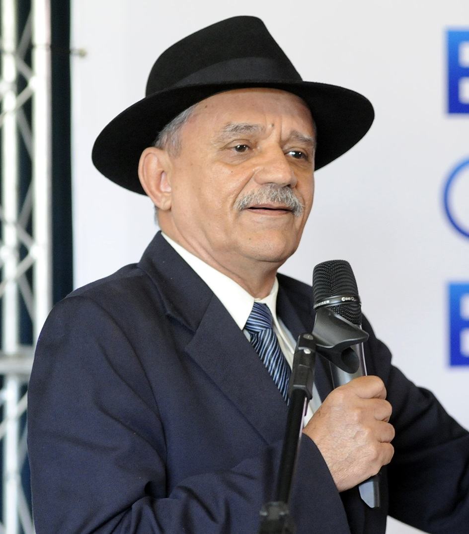 Luiz Carlos Ramos em novembro de 2016.